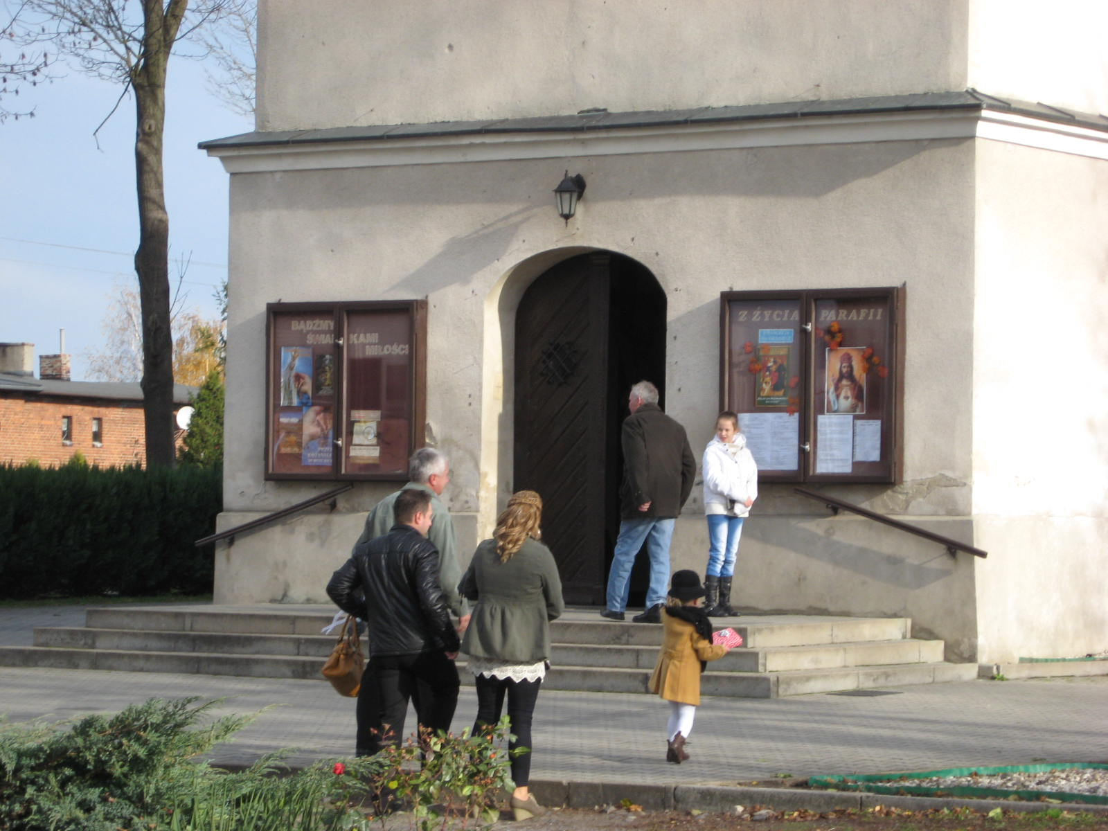 Wejście główne